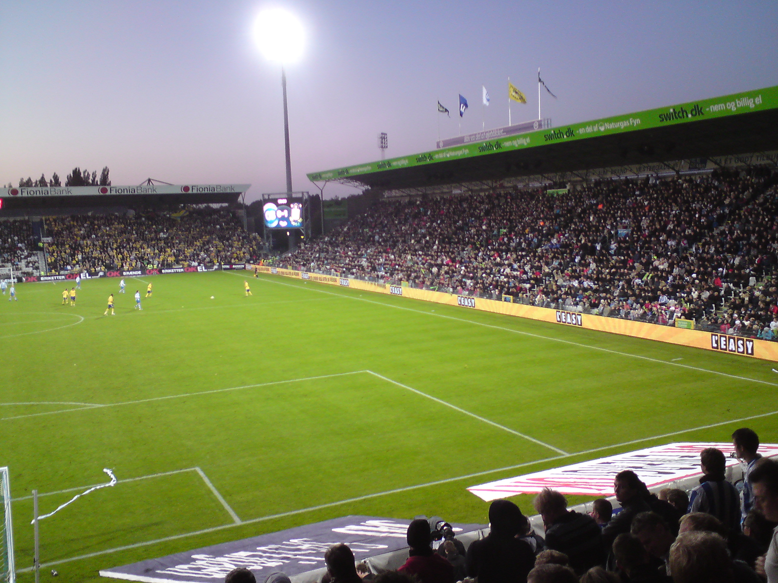 Billede af den største langside (Switch.dk) på Odense Stadion.